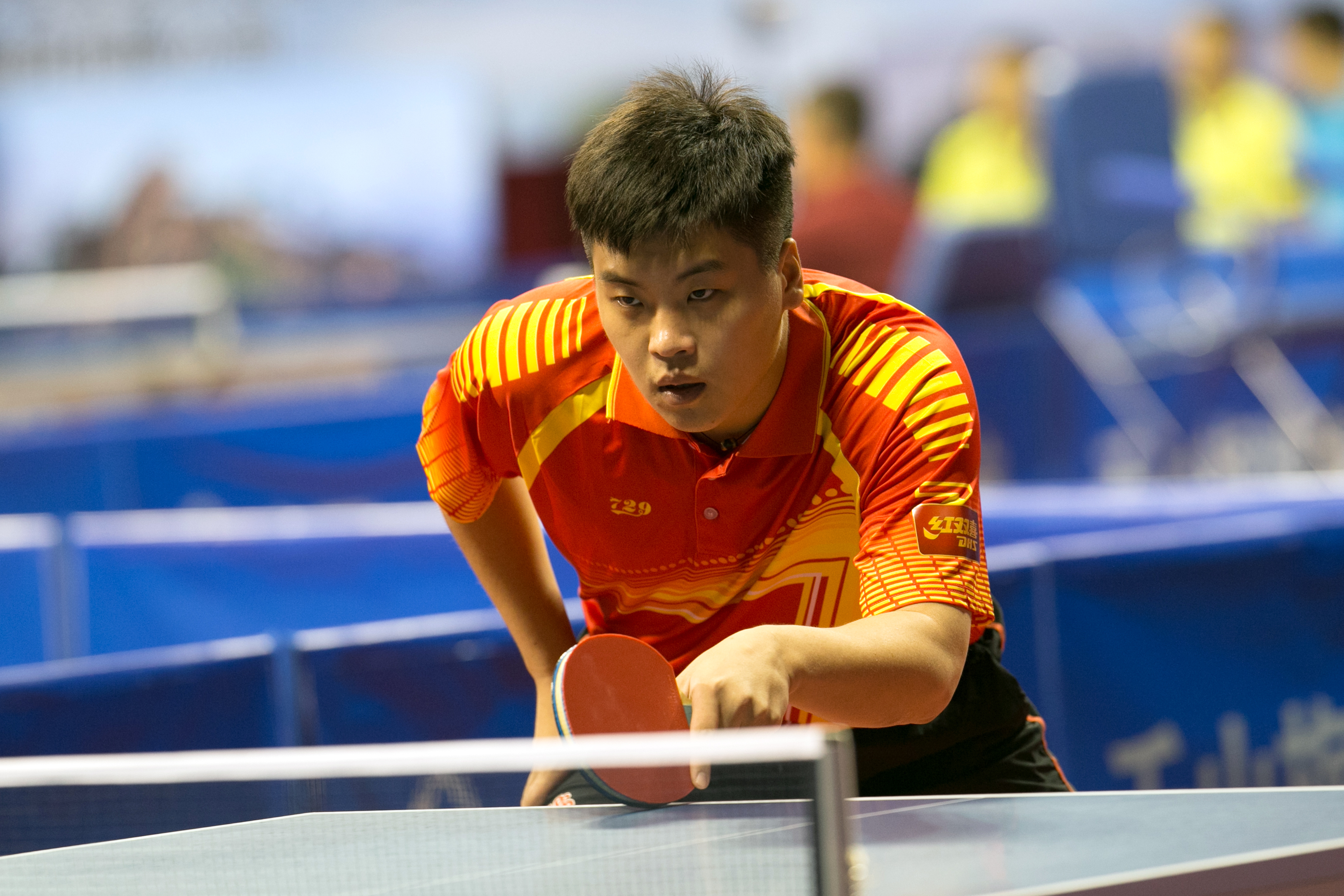 _K0K3602副本